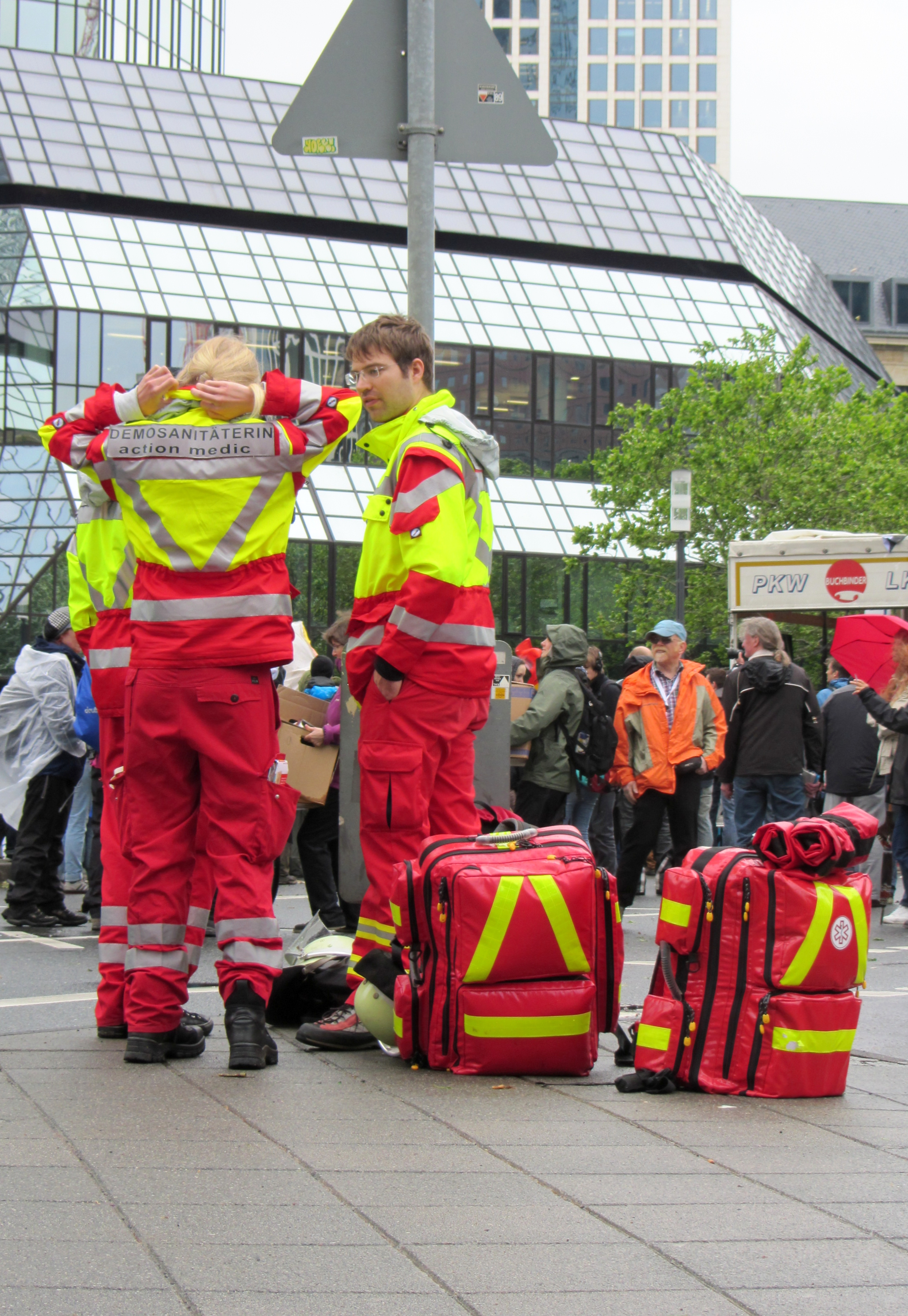 Blockupy 2013: Demosanitäter vor der Zentrale der Deutschen Bank